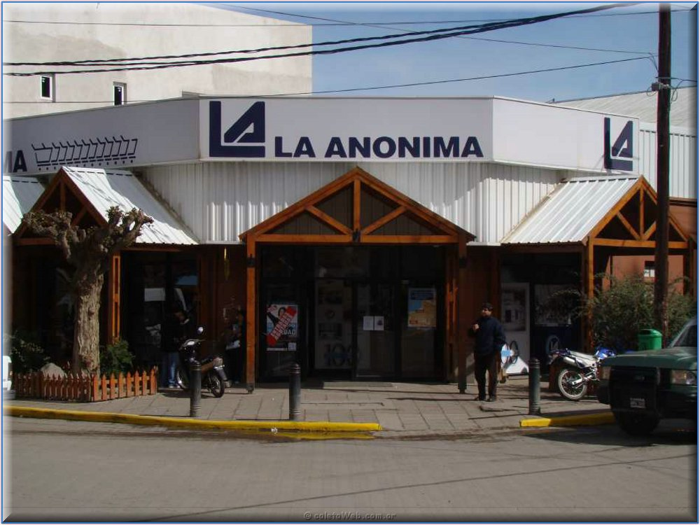 La Anónima - El Calafate